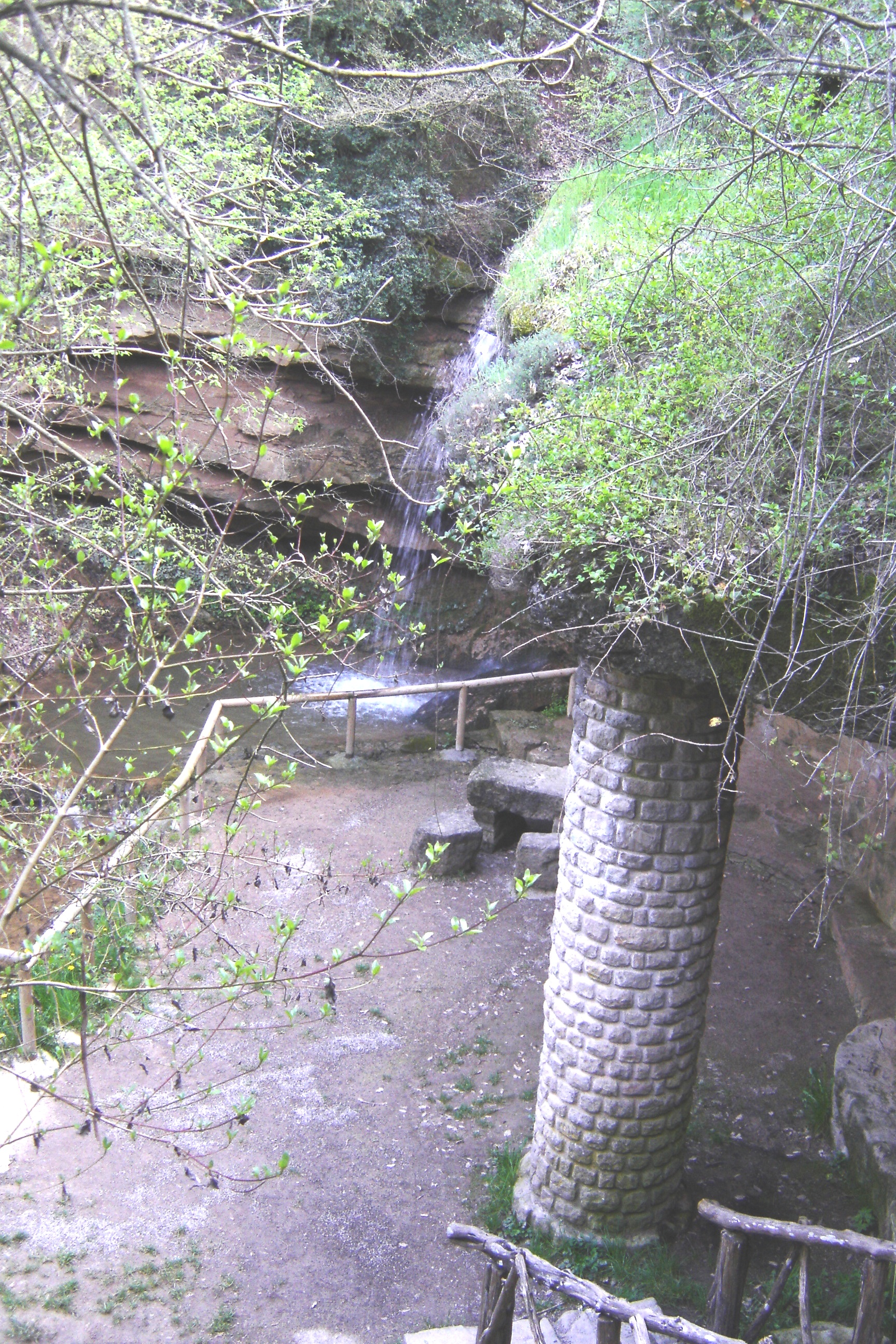 L'entorn de la font de la Mina, a Solsona (Solsonès), vist des de les escales per a baixar-hi